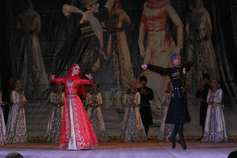 Вайнахский танец - Хэлхар